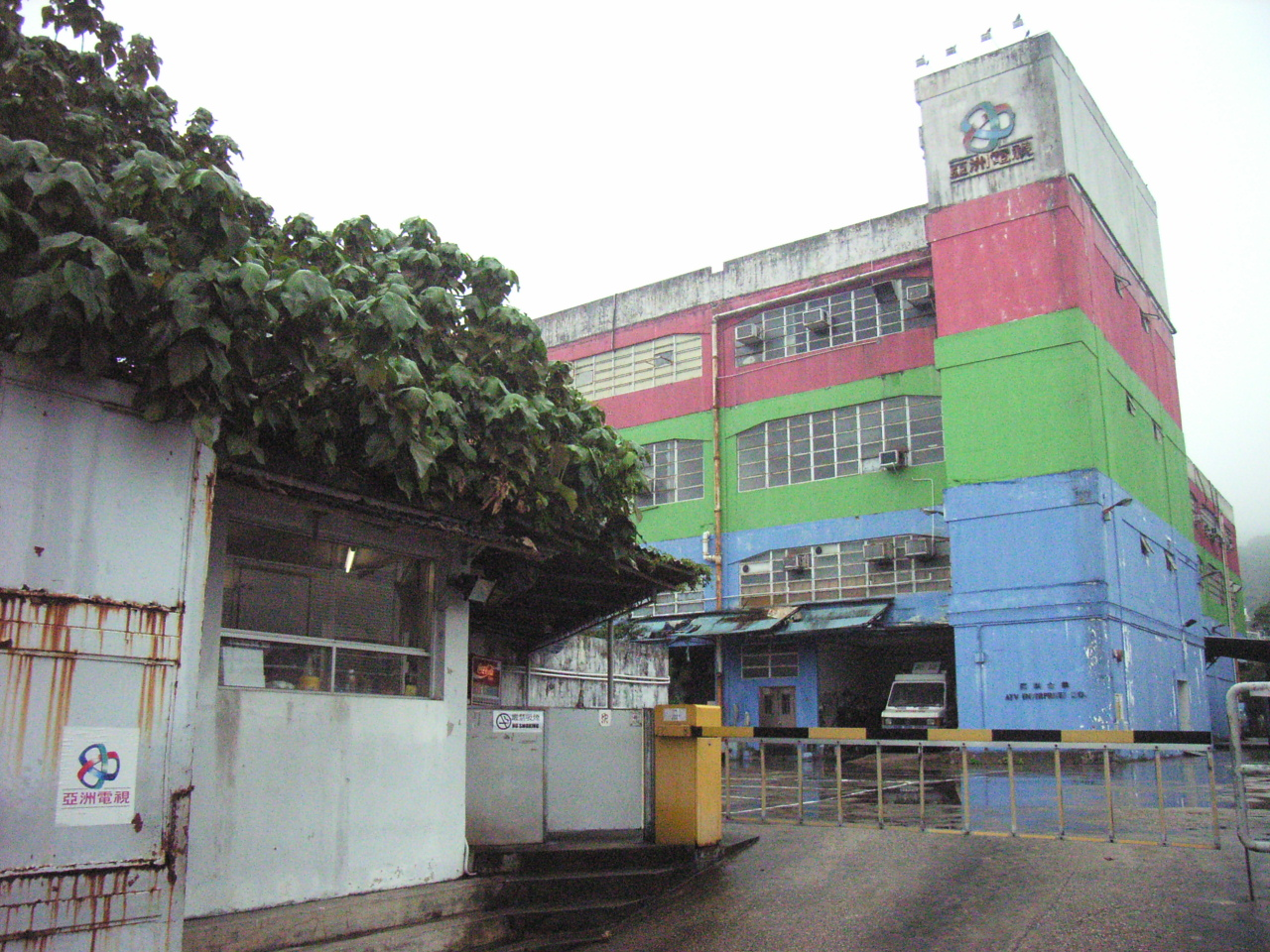 中文（香港）: 香港西貢區蠔涌亞洲電視錄影廠與亞洲電視企業有限公司（亞視企業）總部。